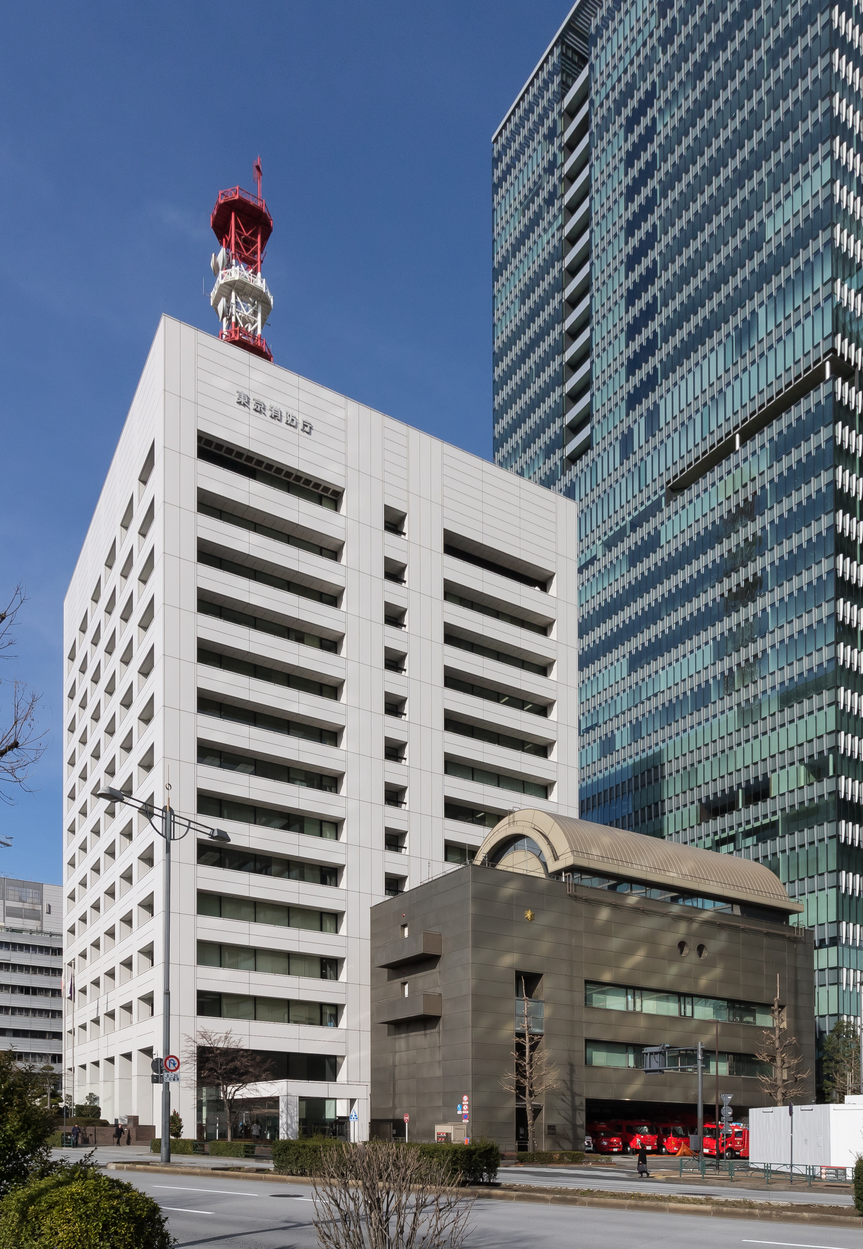 東京消防庁